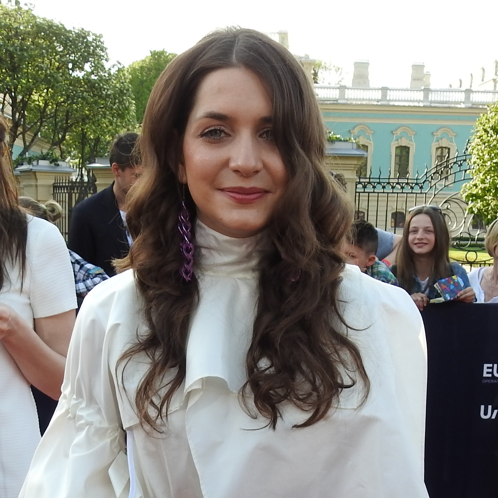 Czeska piosenkarka Martina Barta w maju 2017 roku.